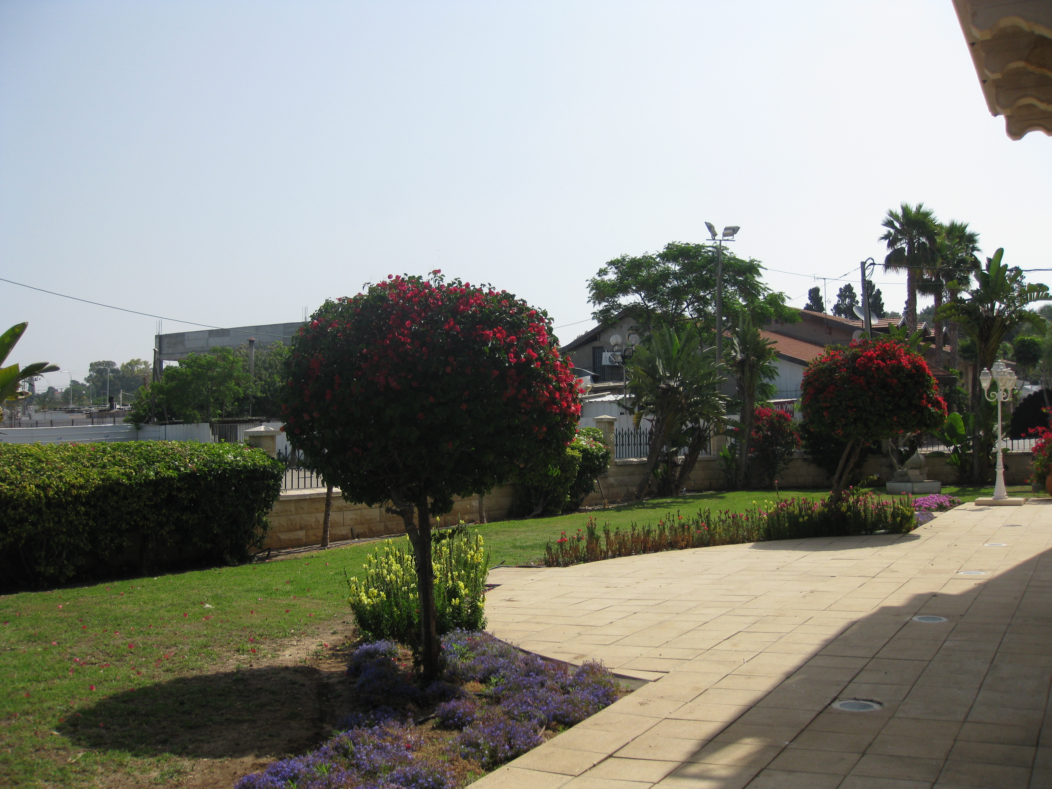 Nahariyya - Liberman House Museum נהריה בית ליברמן - מוזיאון להיסטוריה של נהריה